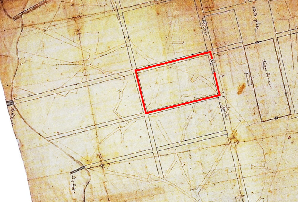 Regleringsplan över Norrmalm med blivande kvarteret Lammet